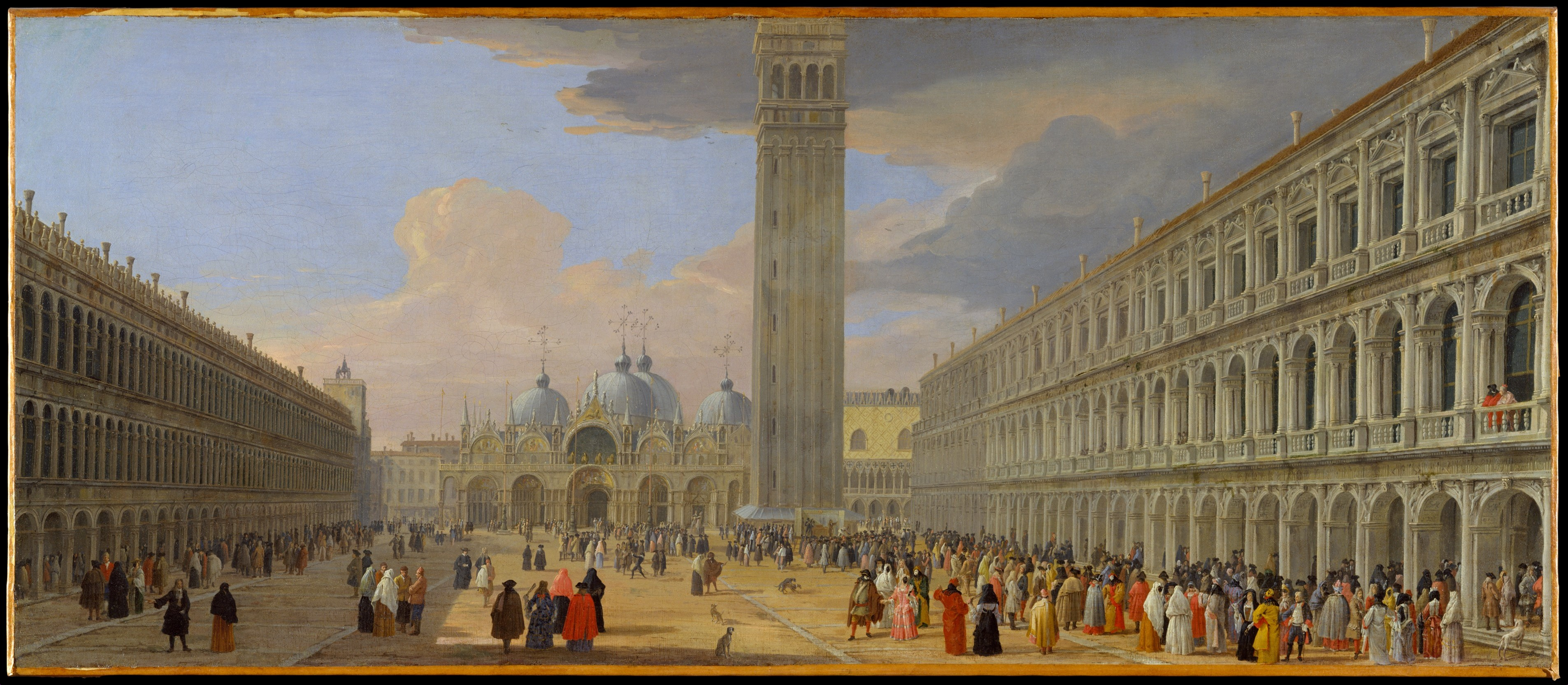 Painting; Paintings